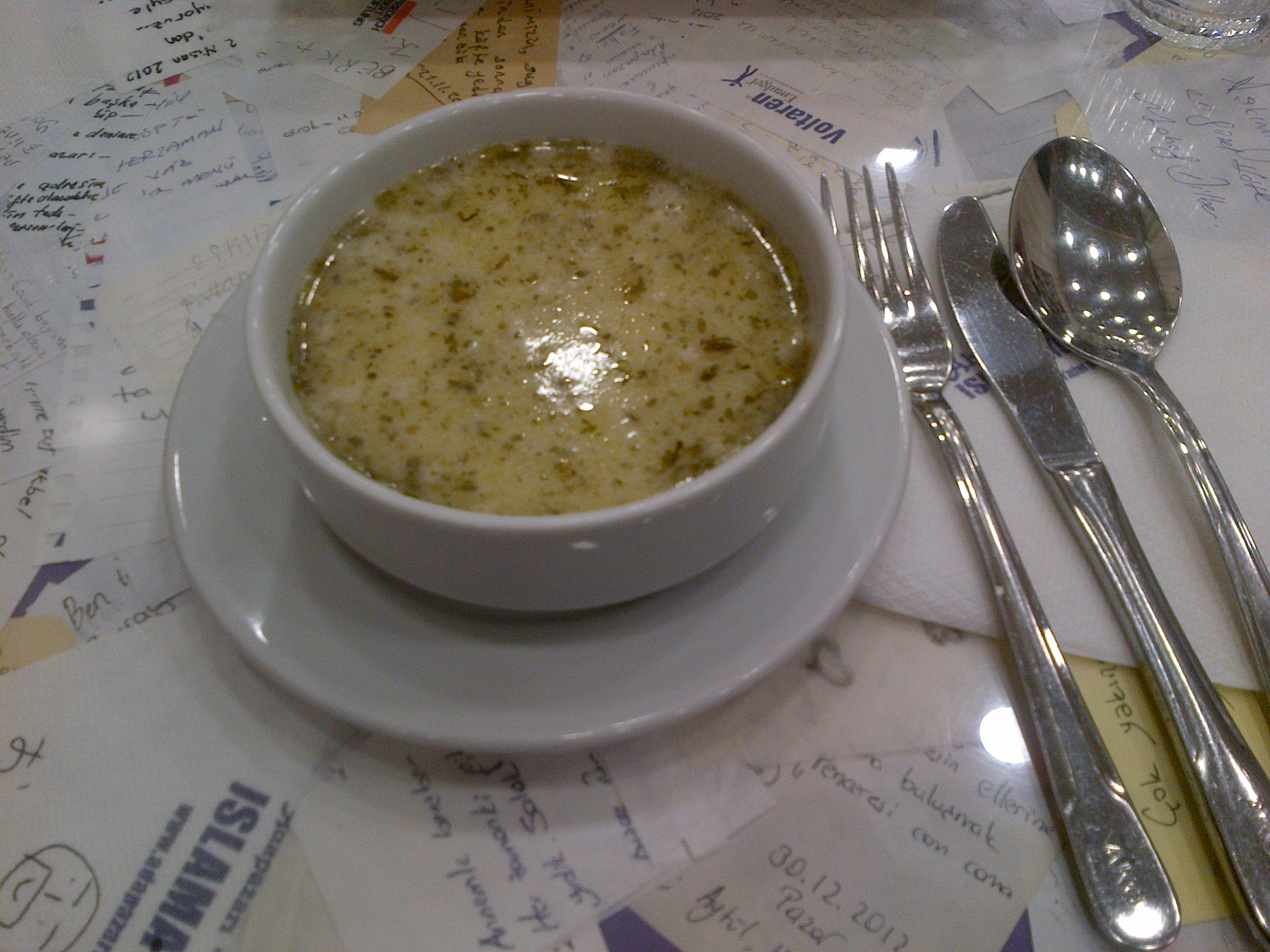 Yayla çorba, de la cocina turca, es una sopa caliente de yogur con arroz, también puede llevar garbanzos y otros ingredientes adicionales.